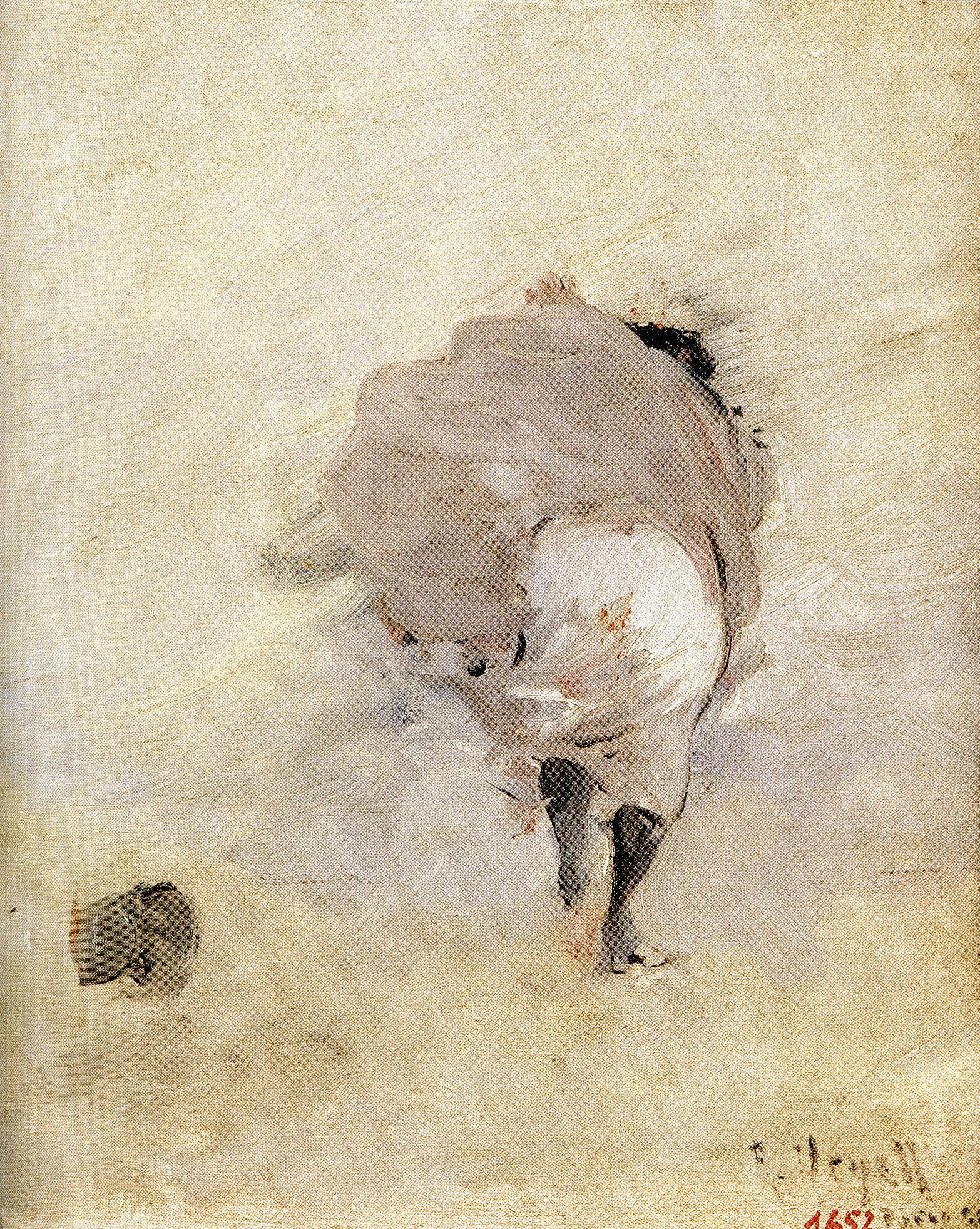 Vent. Dona d'esquenes a la que una ventada aixeca les faldilles. Tons grisos. Va emmarcat